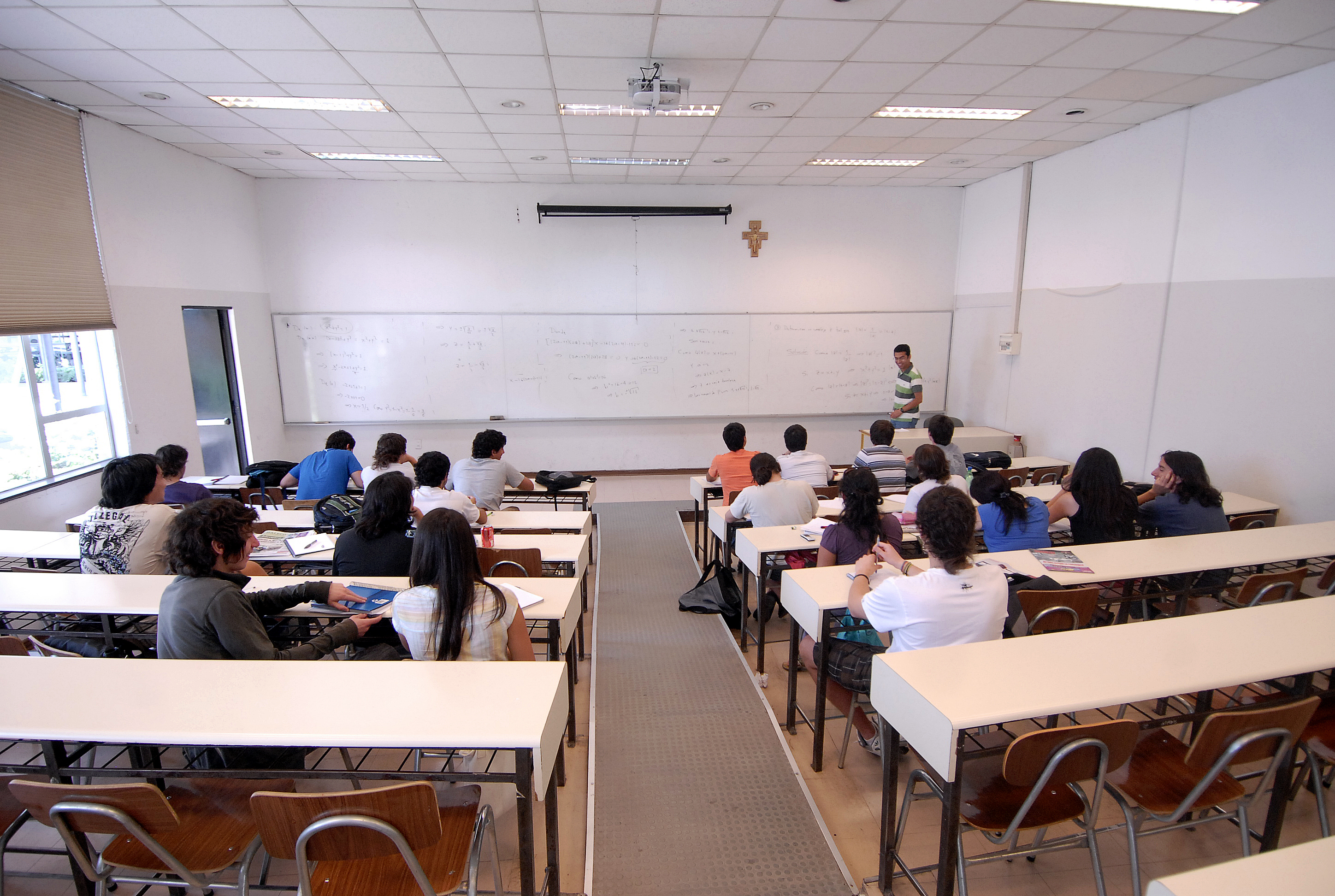 Universidad Católica de Chile